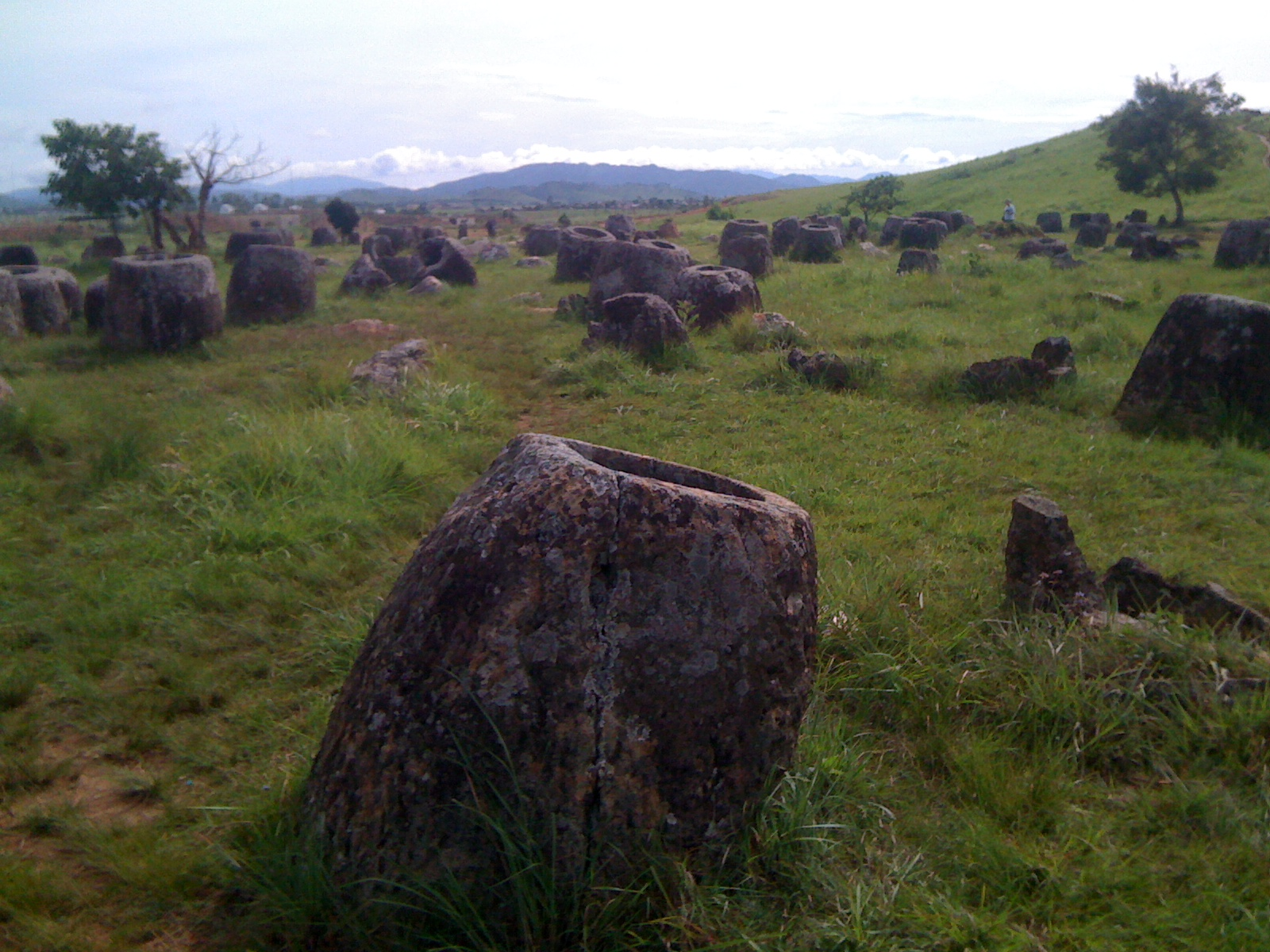 Xiangkhouang Province, Laos